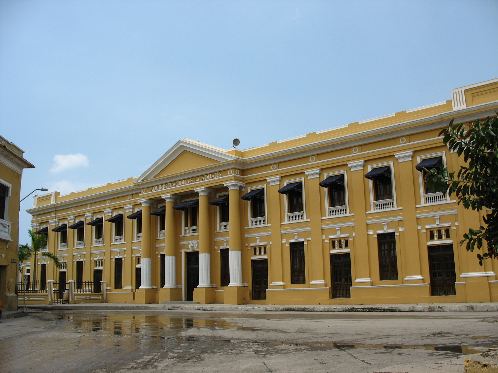 antigua Aduana de Barranquilla